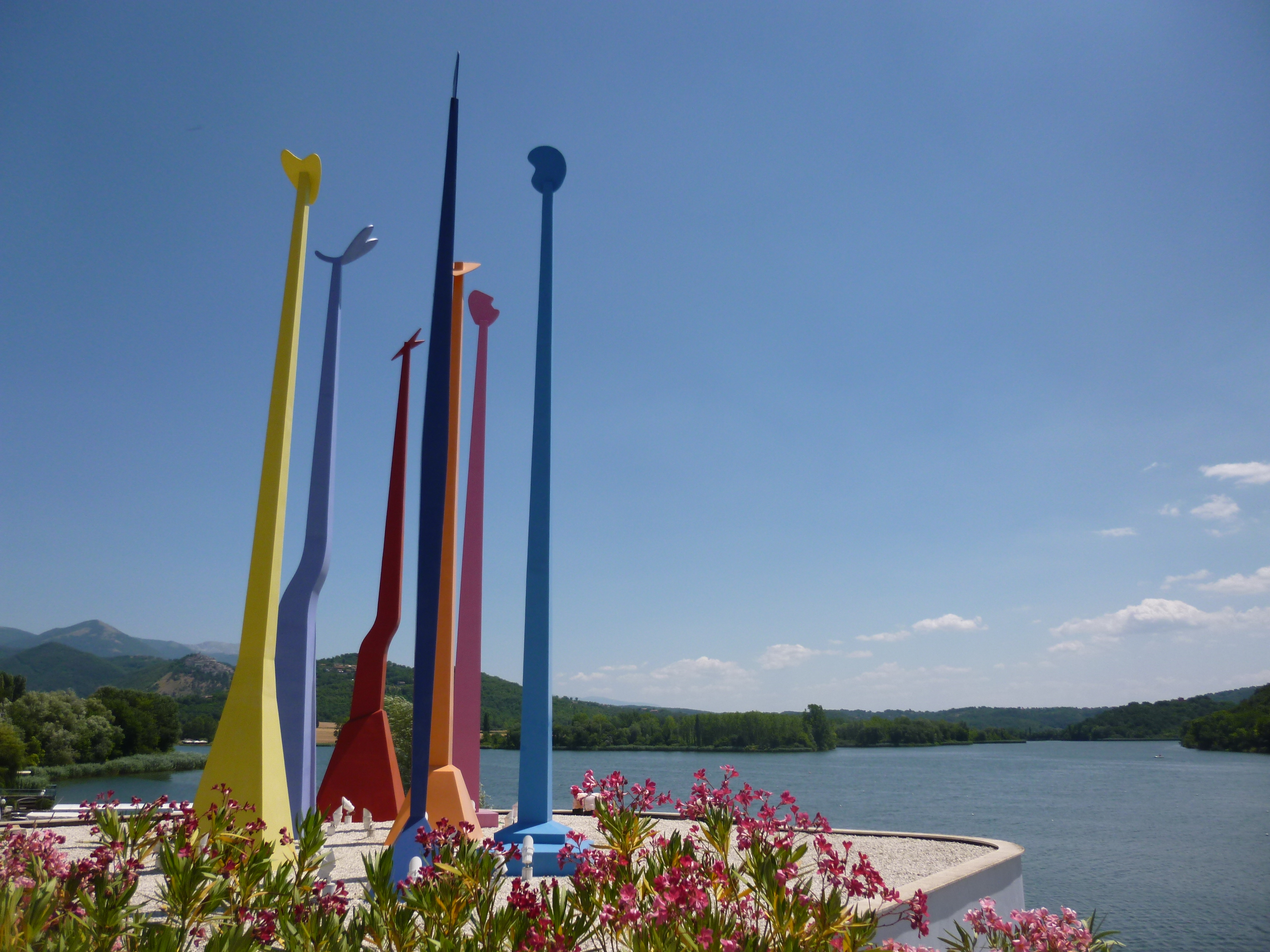 lago di Piediluco This is a photo of a monument which is part of cultural heritage of Italy.